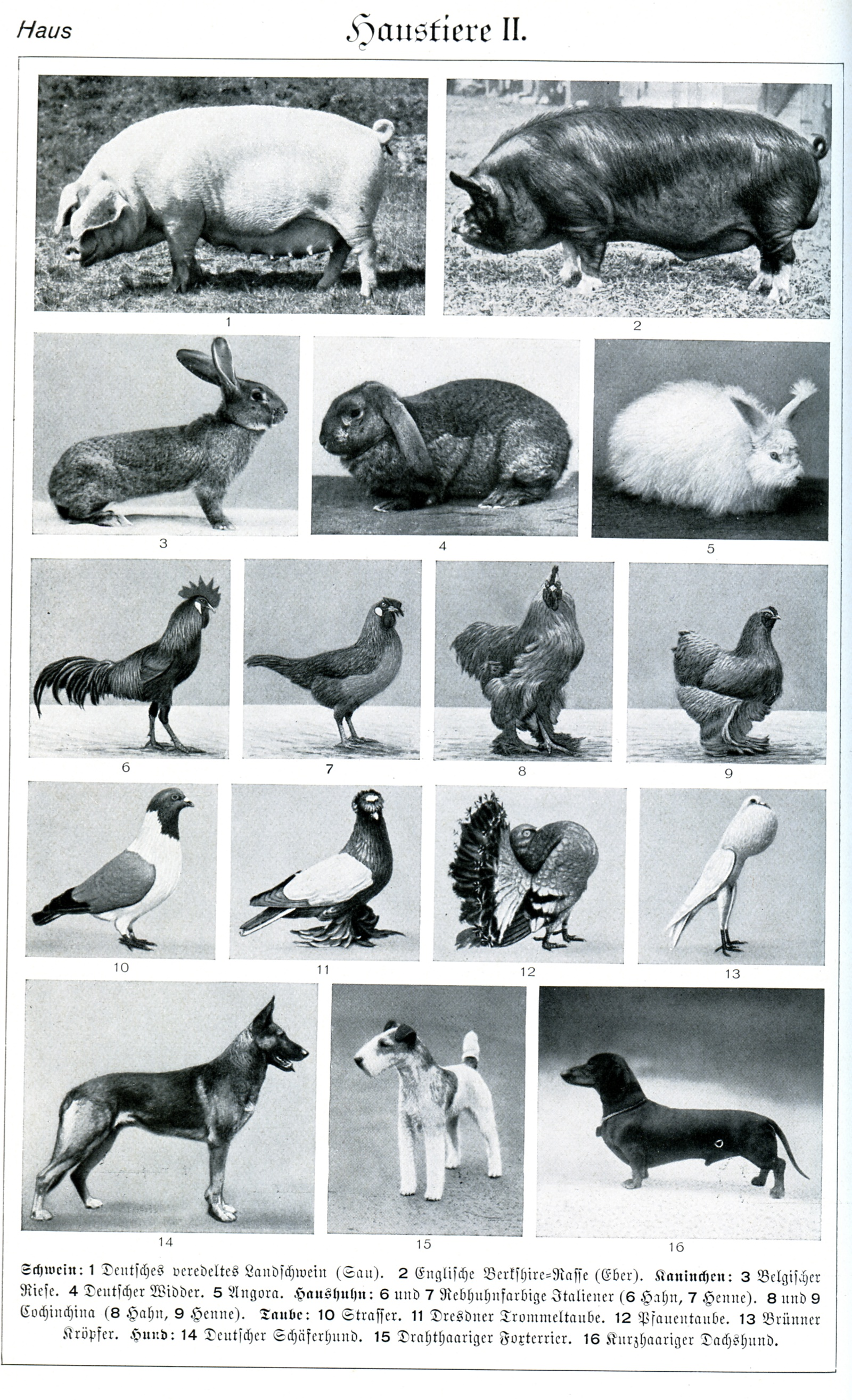 Haustiere II in Brockhaus 1937